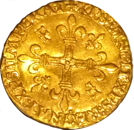 Écu François Ier